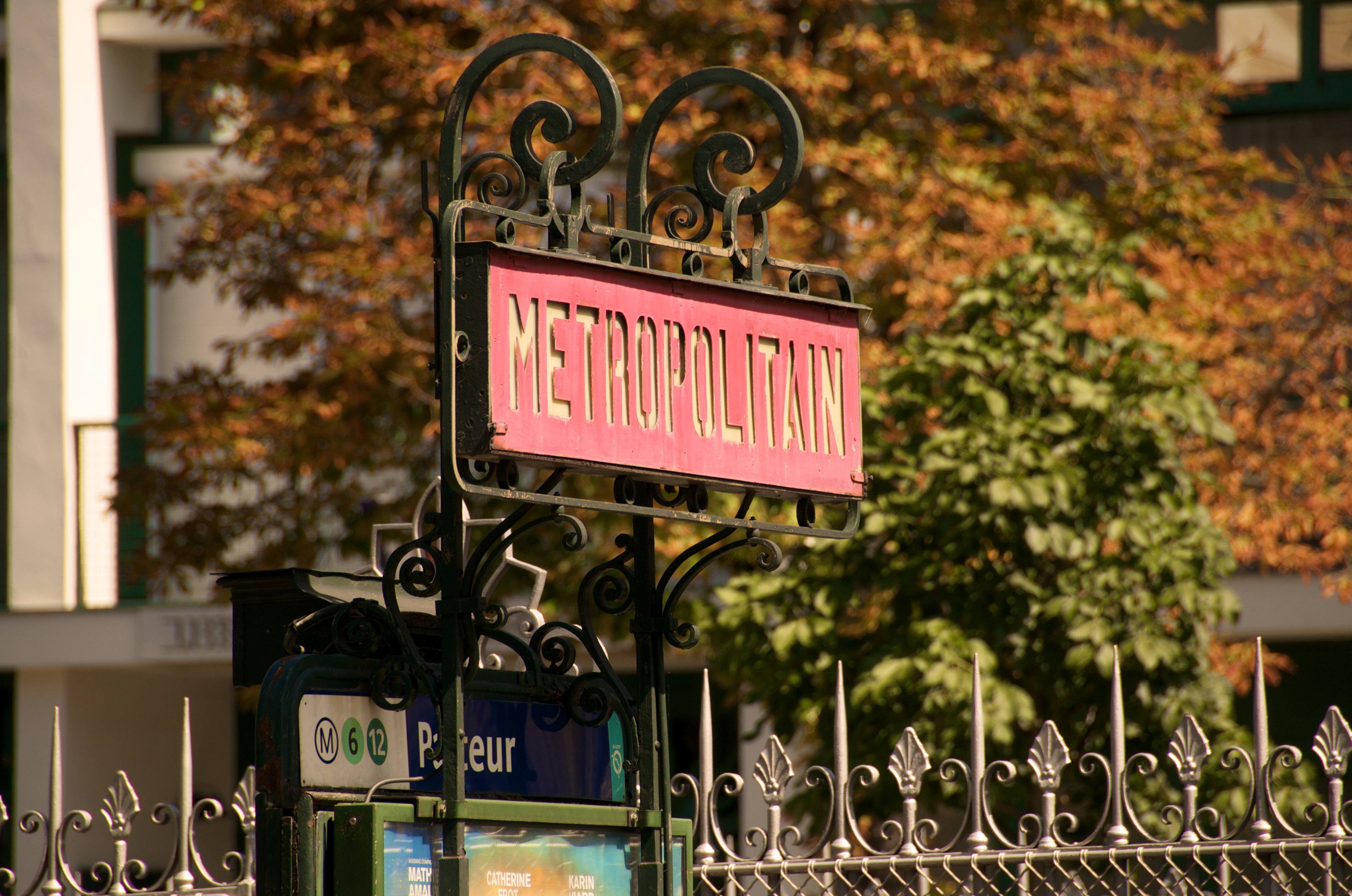 Mat Nord-Sud à la station Pasteur du métro de Paris